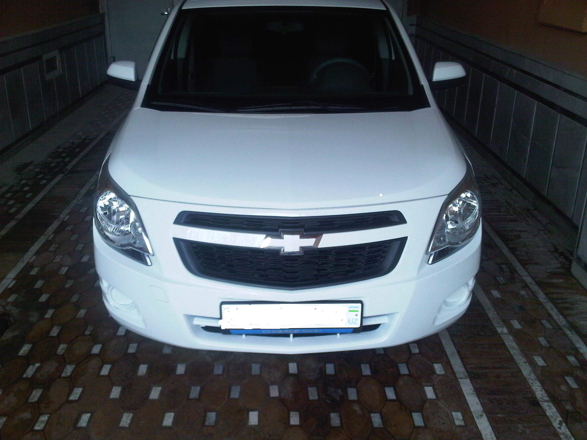 Oʻzbekcha/ўзбекча: Car